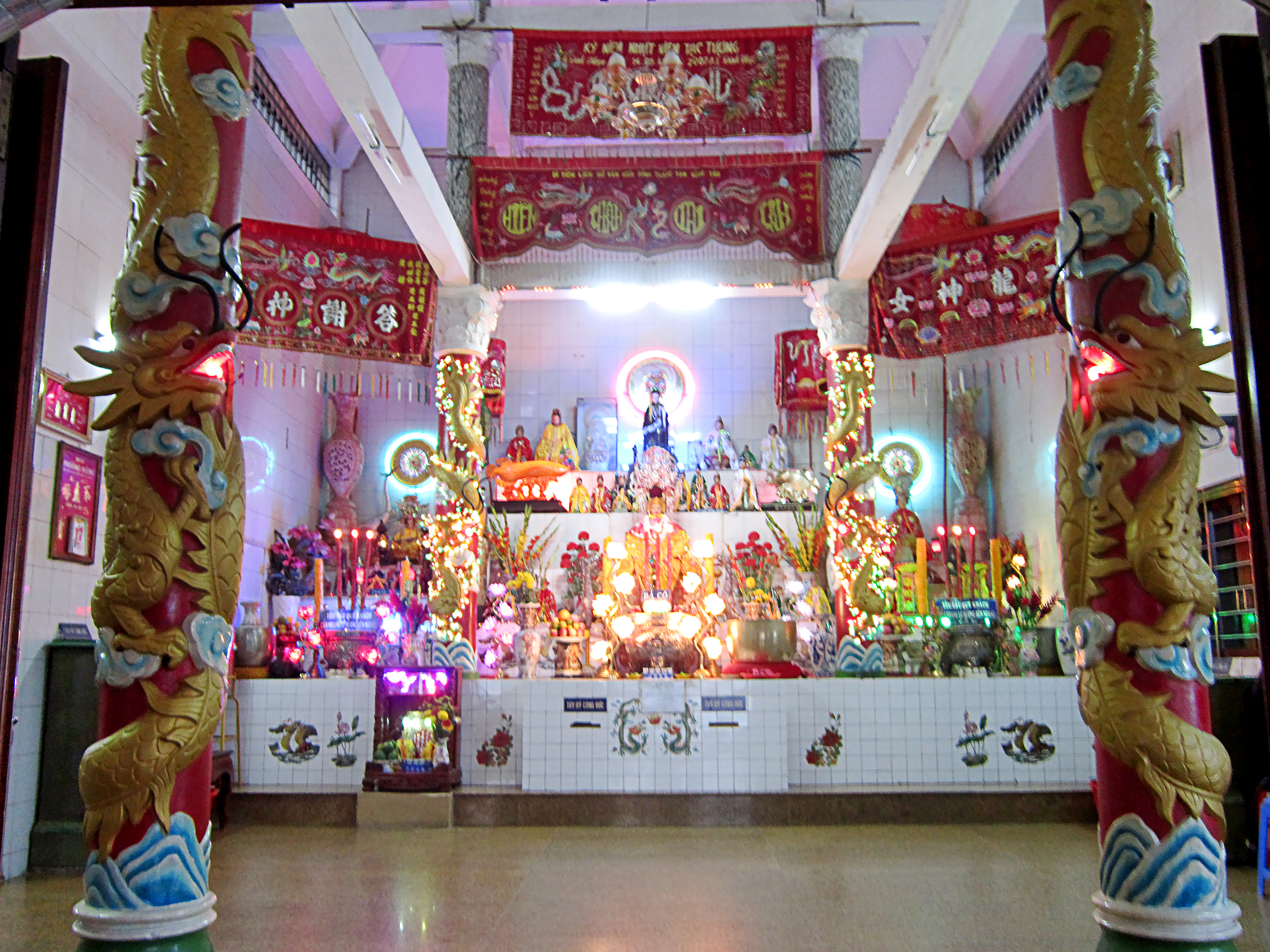 Gian thờ chính trong Dinh Cô ở thị trấn Long Hải, huyện Long Điền, tỉnh Bà Rịa-Vũng Tàu, Việt Nam.